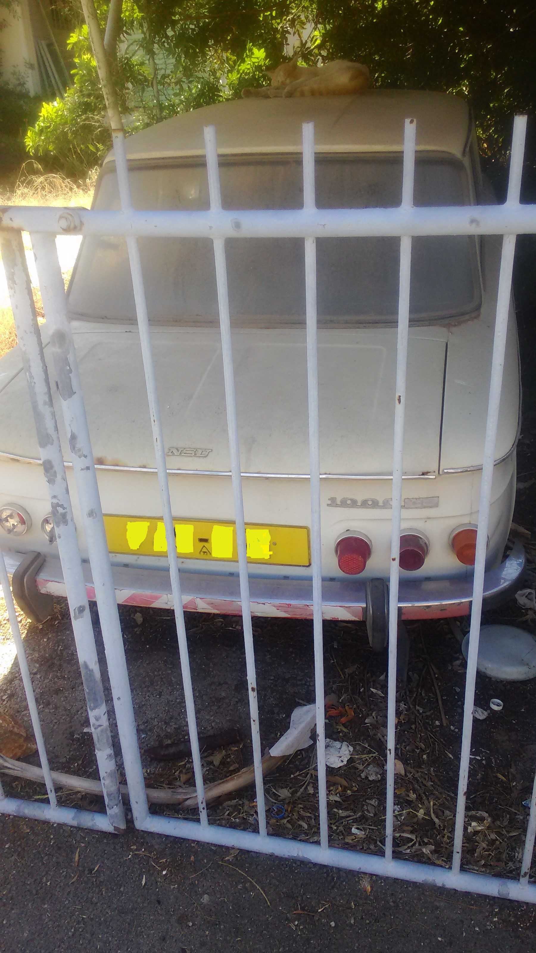 בישראל NSU